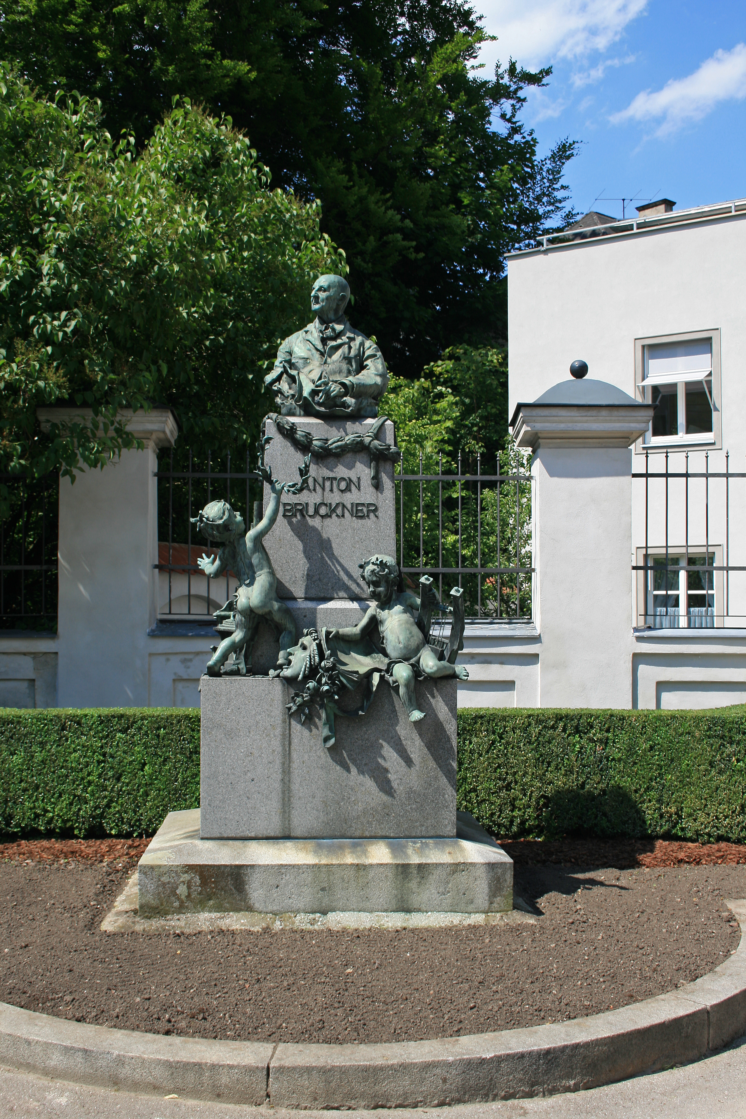 Büste des Komponisten Anton Bruckner am Steyrer Brucknerplatz bei der Stadtpfarrkirche. Die Büste stammt von Viktor Tilgner, das Beiwerk von Friedrich (Fritz) Zerritsch.